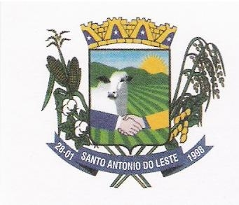 Brasão oficial de Santo Antonio do Leste